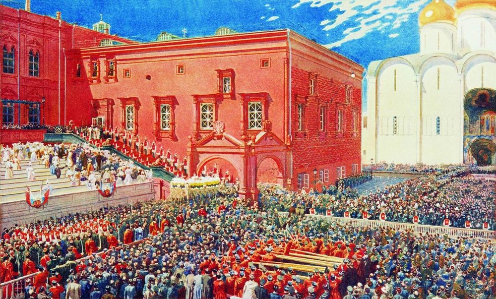 Поклон с красного крыльца. Иллюстрация к коронационному альбому